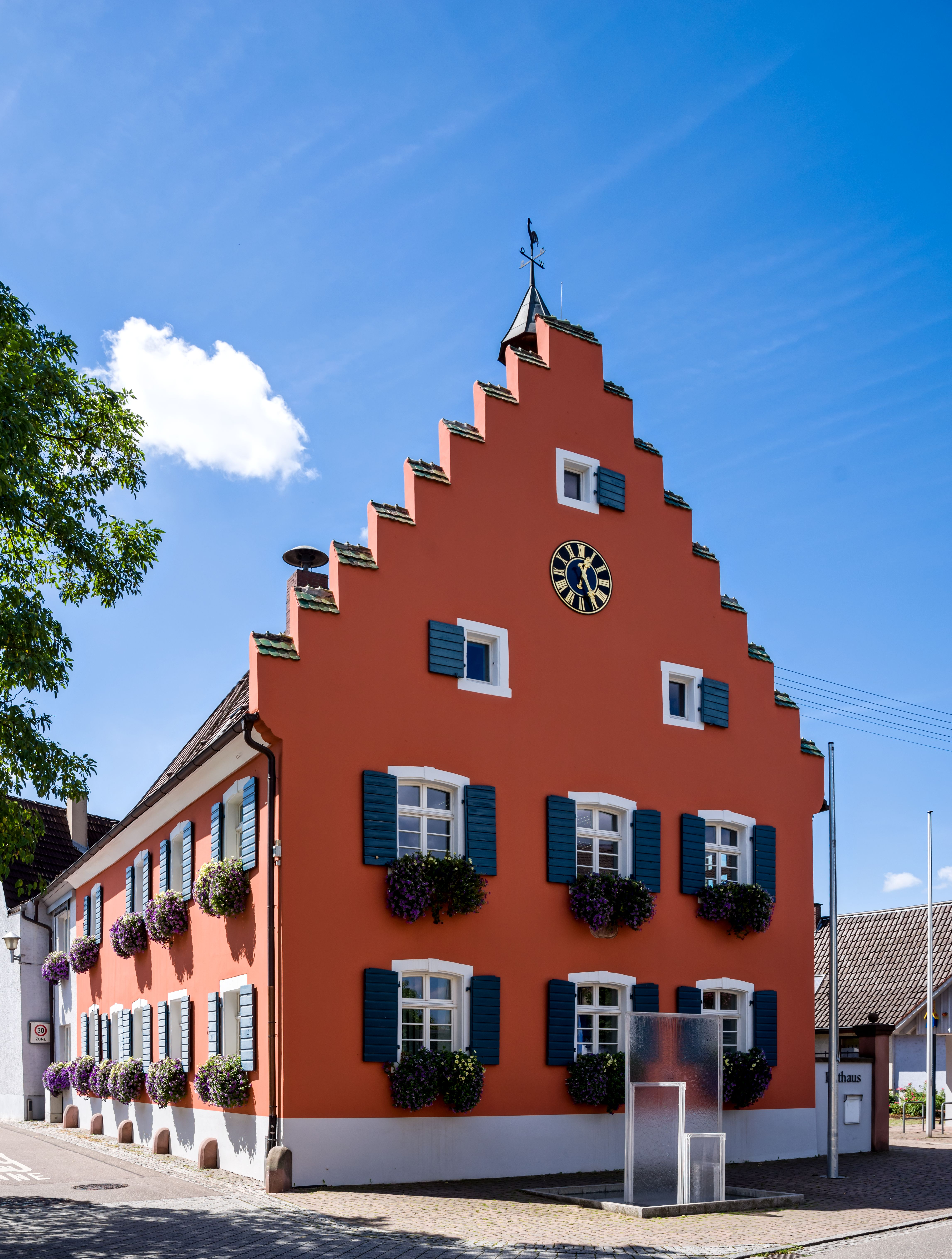 Bilder aus Gottenheim Das Rathaus